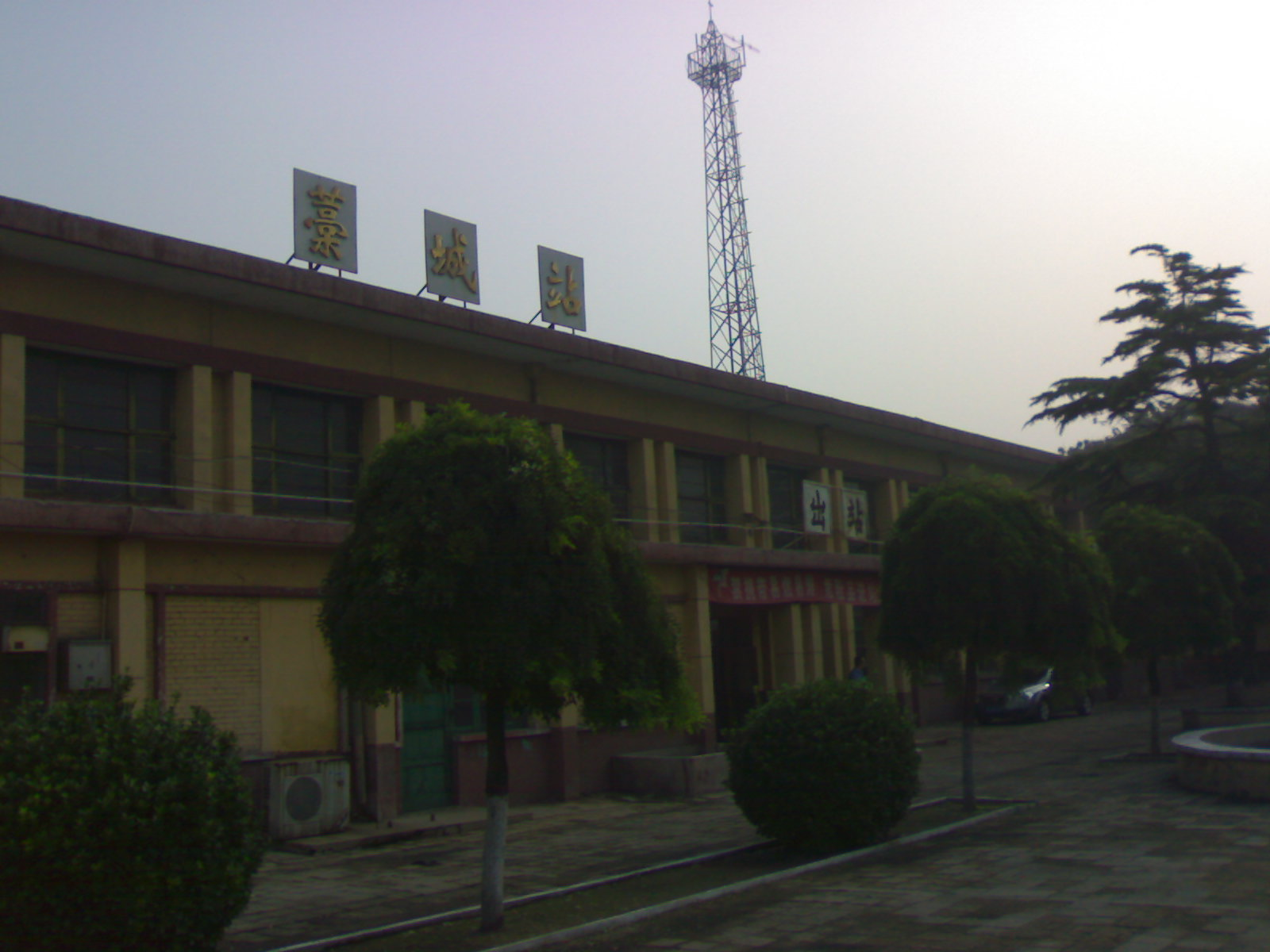 藁城站站房，摄于2012年7月15日。